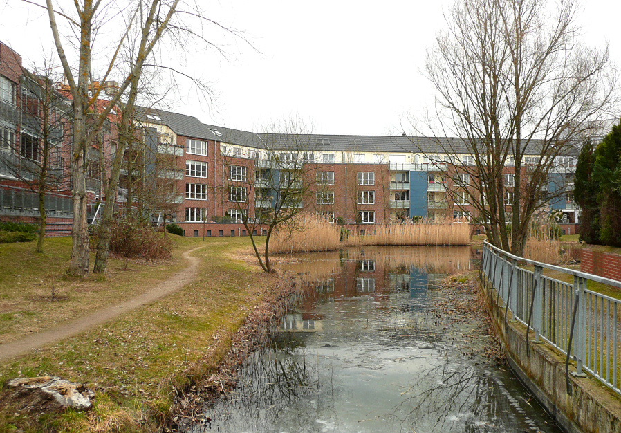 Innenteich im Bereich früherer Döhrener Wolle